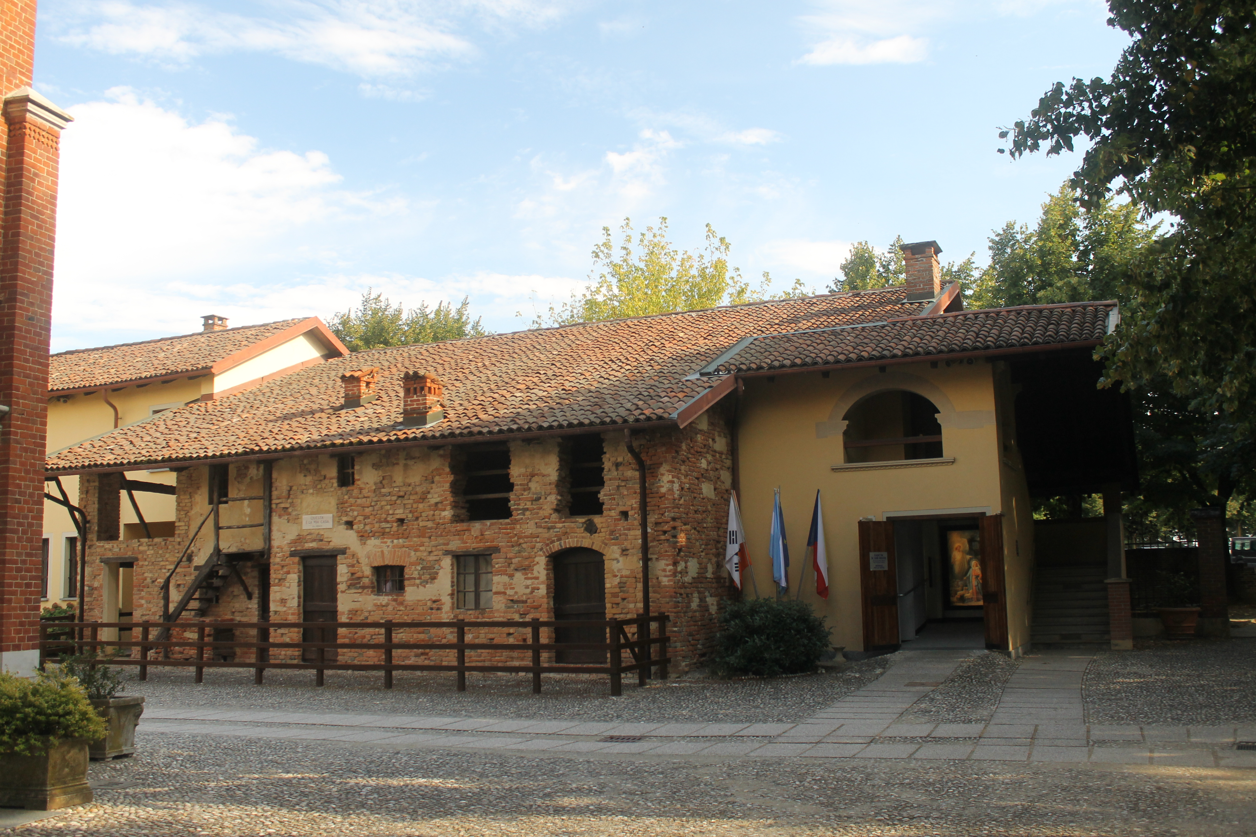 Casetta di don Bosco This is a photo of a monument which is part of cultural heritage of Italy.